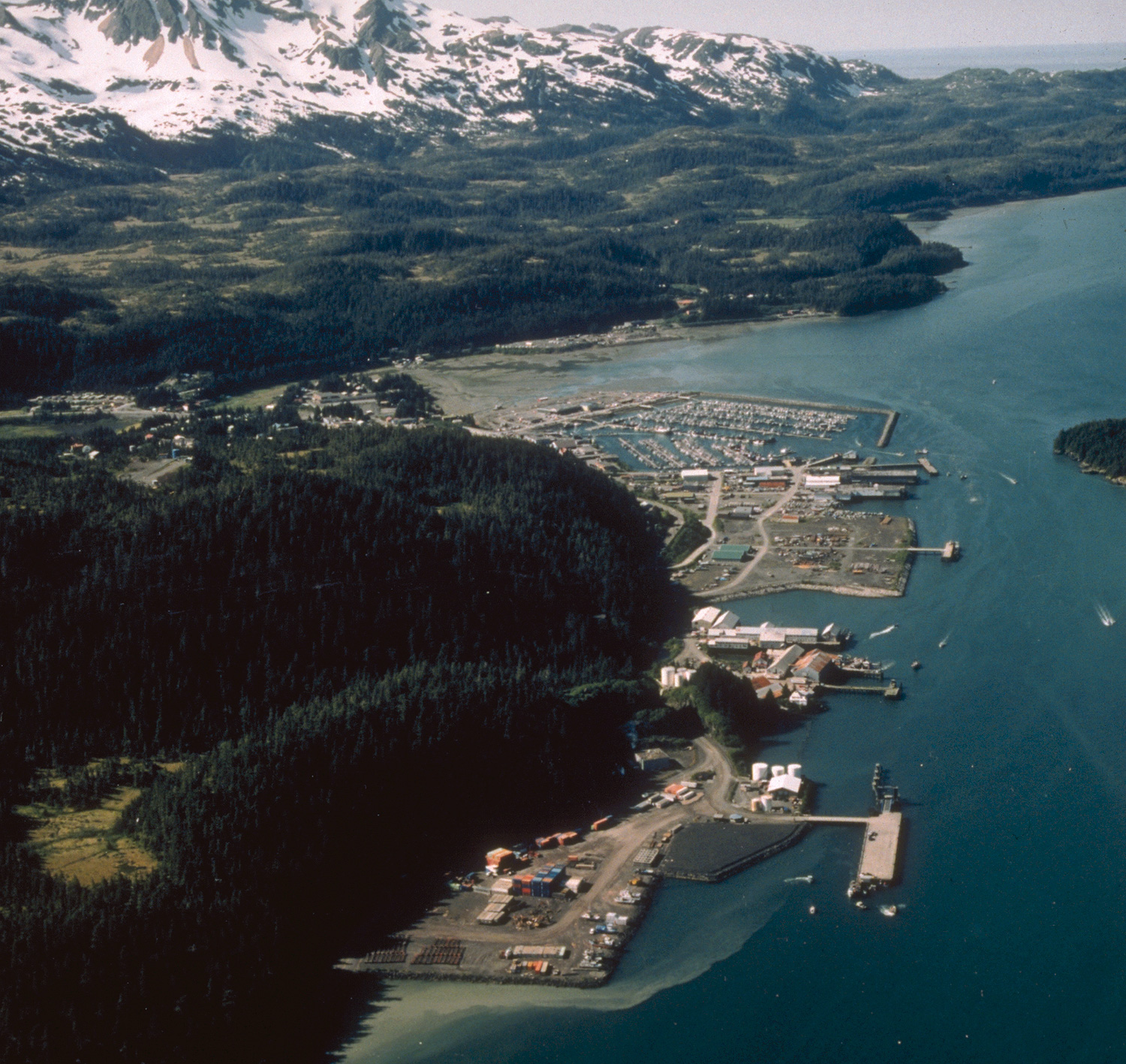 Aerial view of Cordova, Alaska.